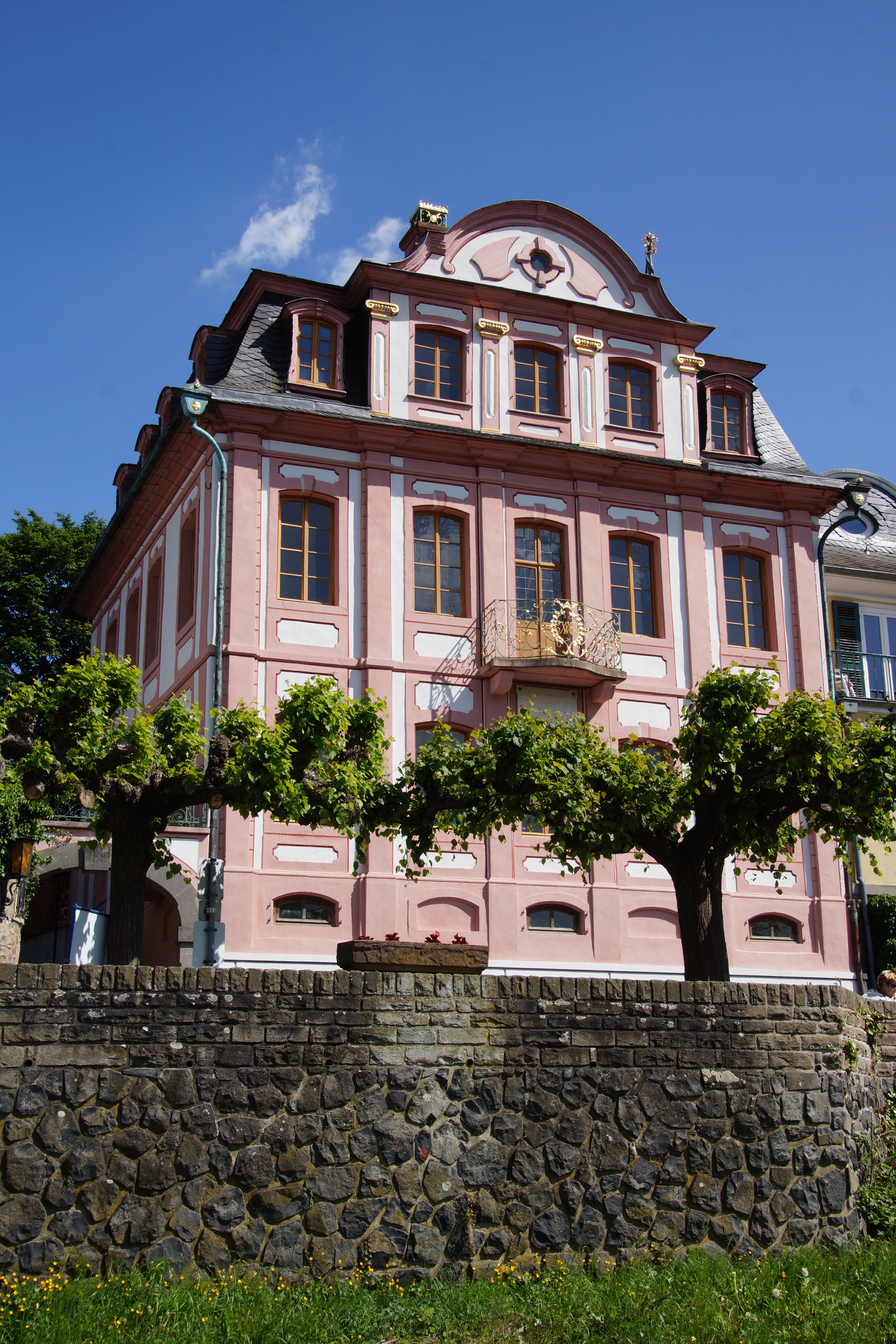 Freiligrathhaus in Unkel: Rheinseite (Günther-Lauffs-Promenade)